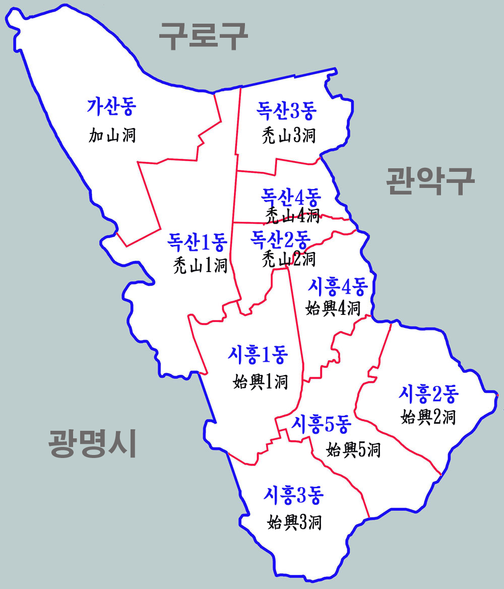 서울시 금천구 행정구역도